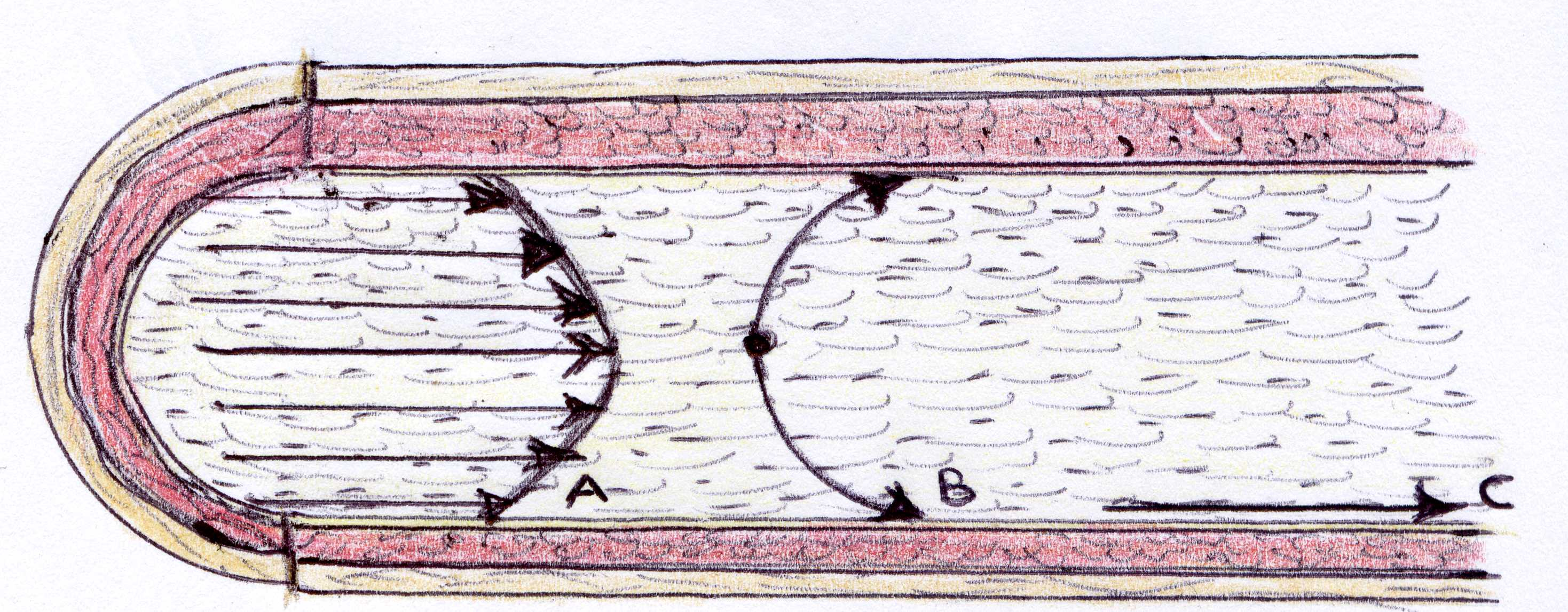 Diagramma delle forze esercitate dal flusso ematico sulla parete arteriosa.